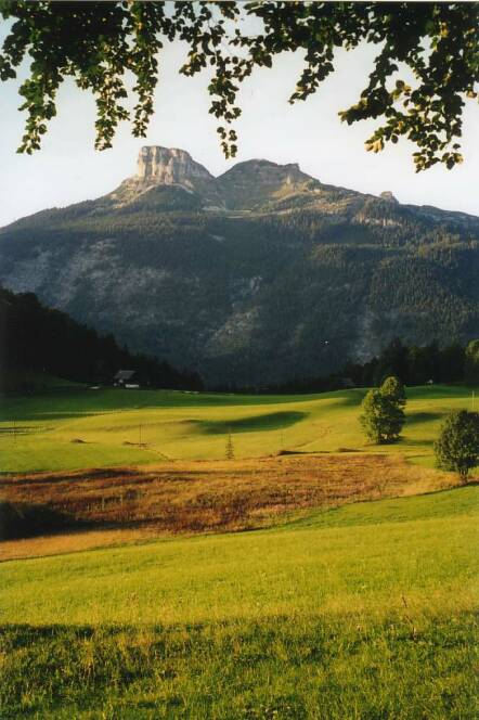 Loser, Berg bei Altaussee